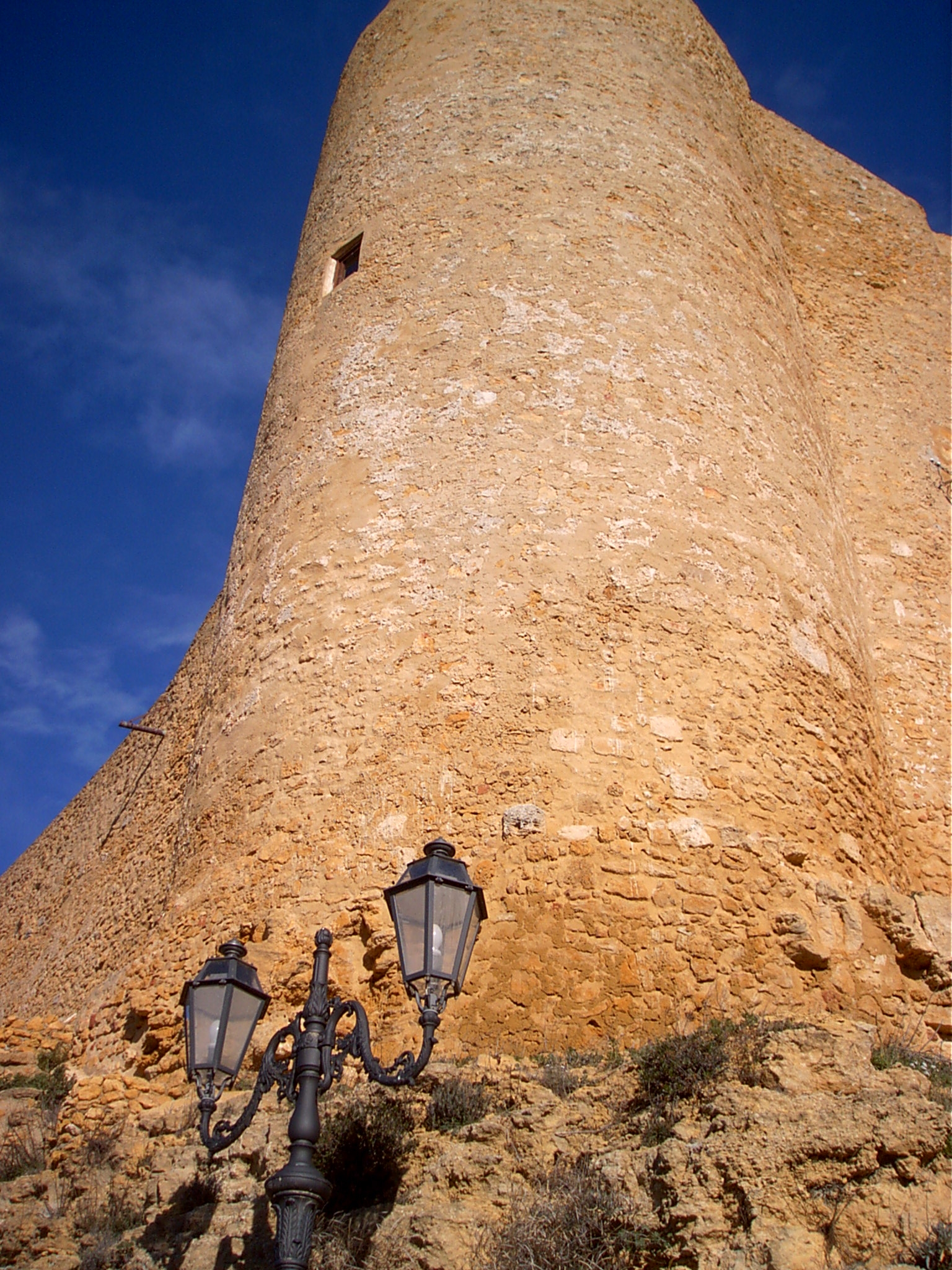 Scorcio del castello di Naro, Province of Agrigento, Sicily, Castle